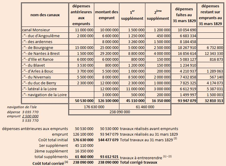 tableau commission canaux 1828